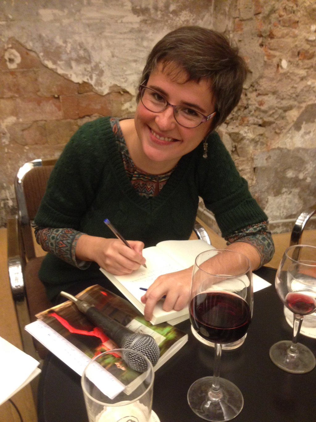 Anna Ballbona durant la presentació del seu llibre 2016